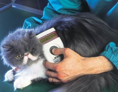 Определяне на номера на микрочипа при котка